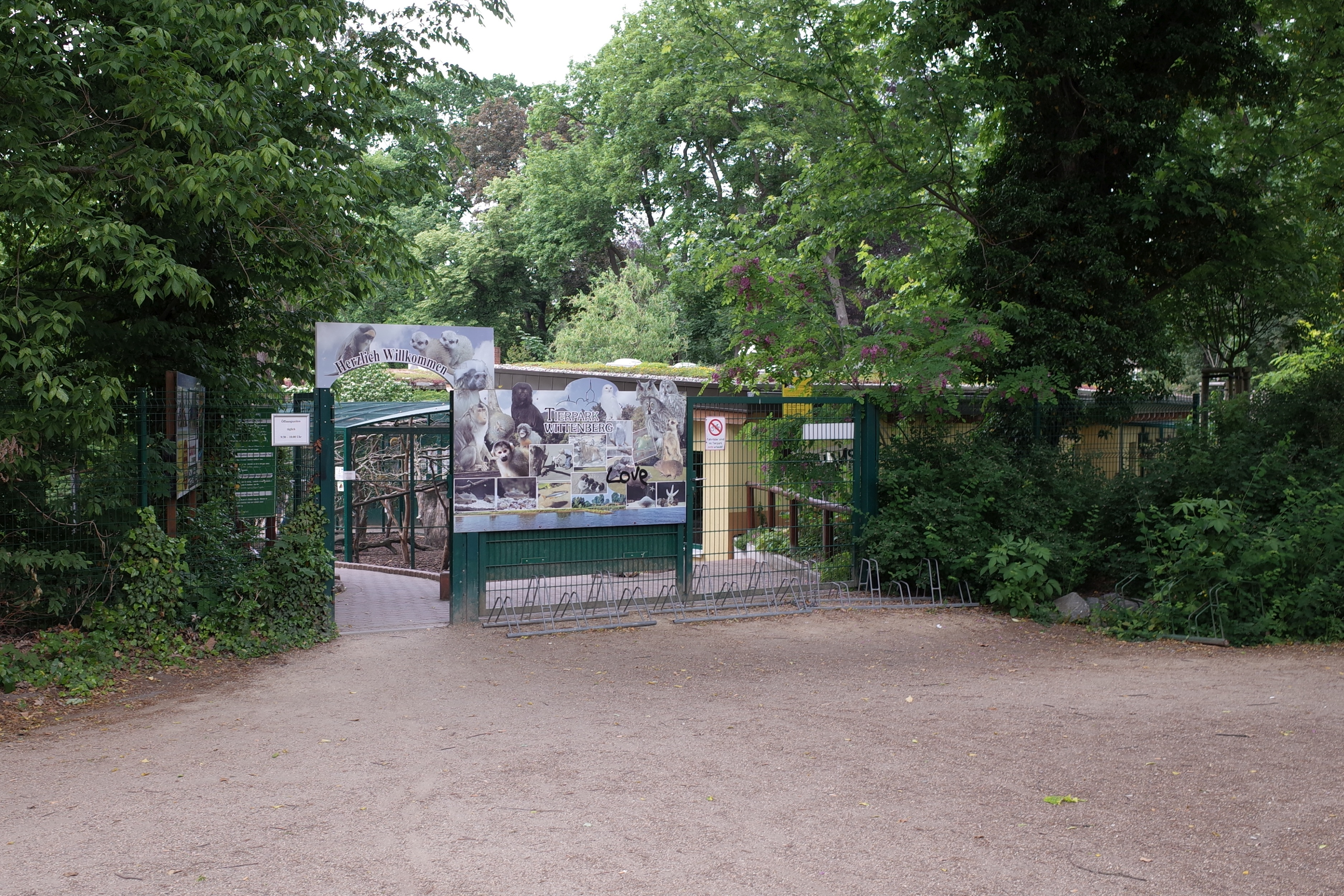 Lutherstadt Wittenberg, Eingang in den Wittenberger Tierpark